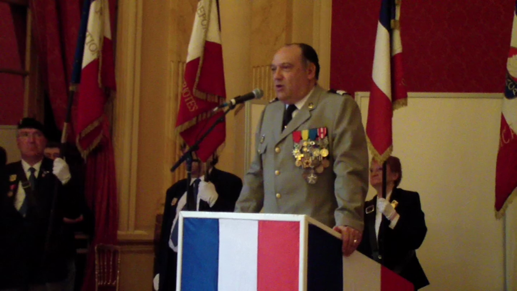 Cérémonie de remise de médaille aux anciens combattants. Romainville 2011